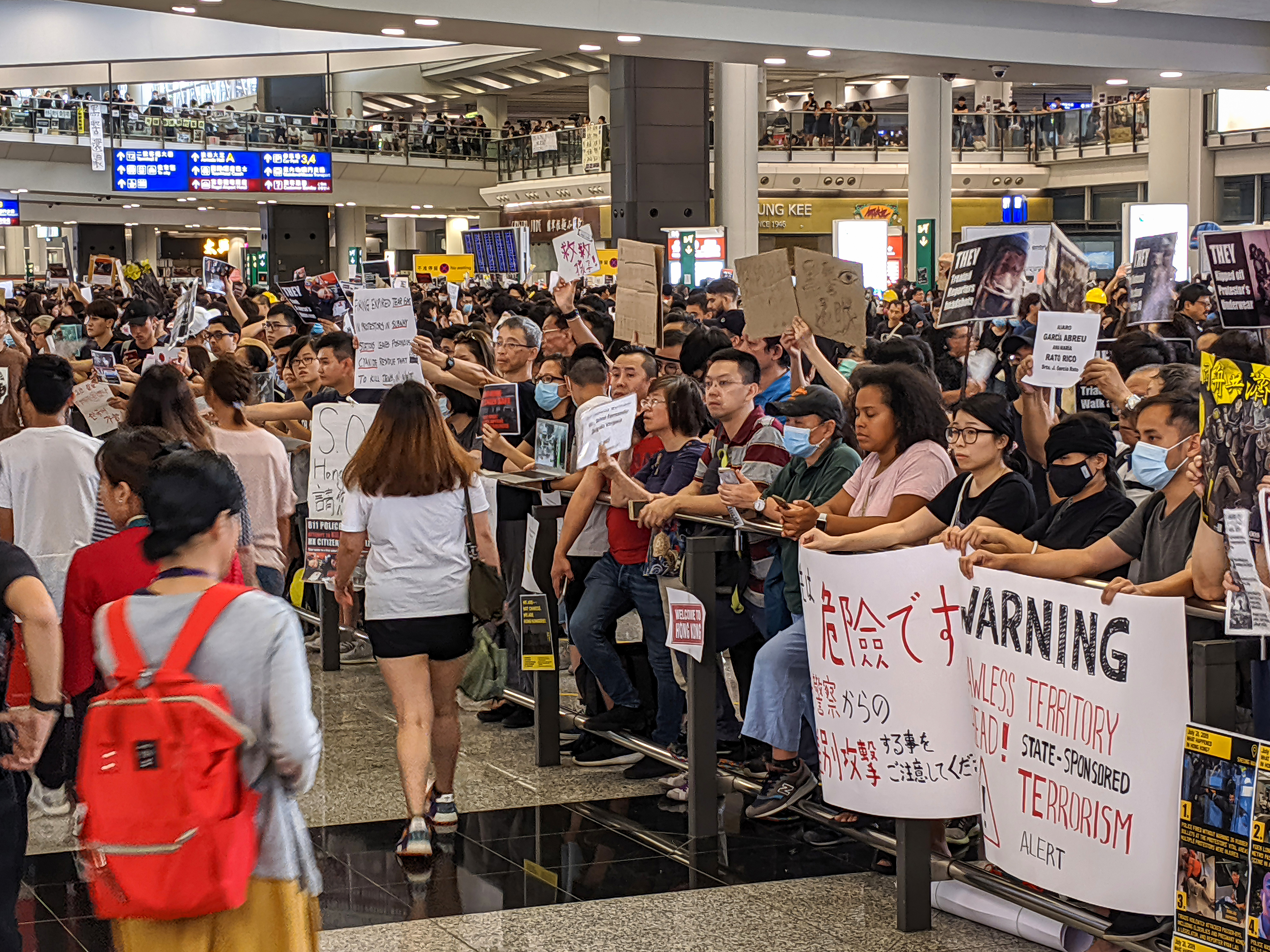 Hong Kong Airport August 2019